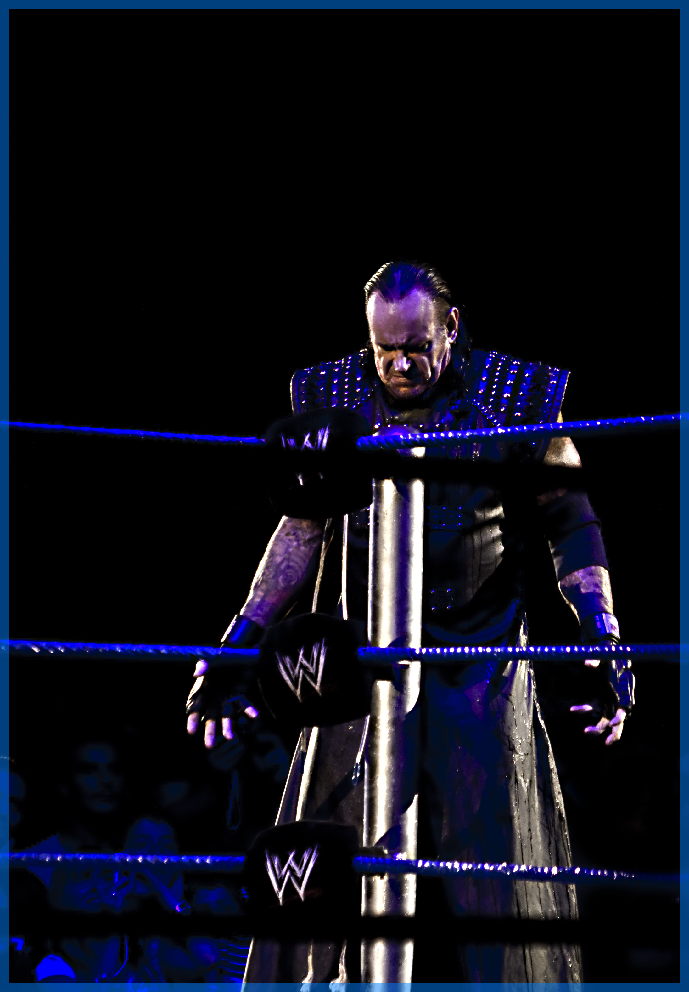 luchador de la WWE Undertaker